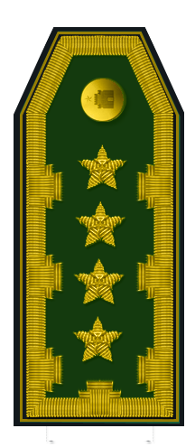 Será de terciopelo color verde alemán de 13 cm. de largo por 6 cm. de ancho, terminada en forma de trapecio e irá colocada sobre una base de tercio pelo verde boldo. Sobre la pala, llevará un ribete perimetral almenado de 1 cm. de espesor bordado en hilo metálico de color dorado. En el perímetro exterior de la pala, llevará un cordón de 2 mm. de espesor, del mismo color y sobre ella irá el grado representado por cuatro estrellas.